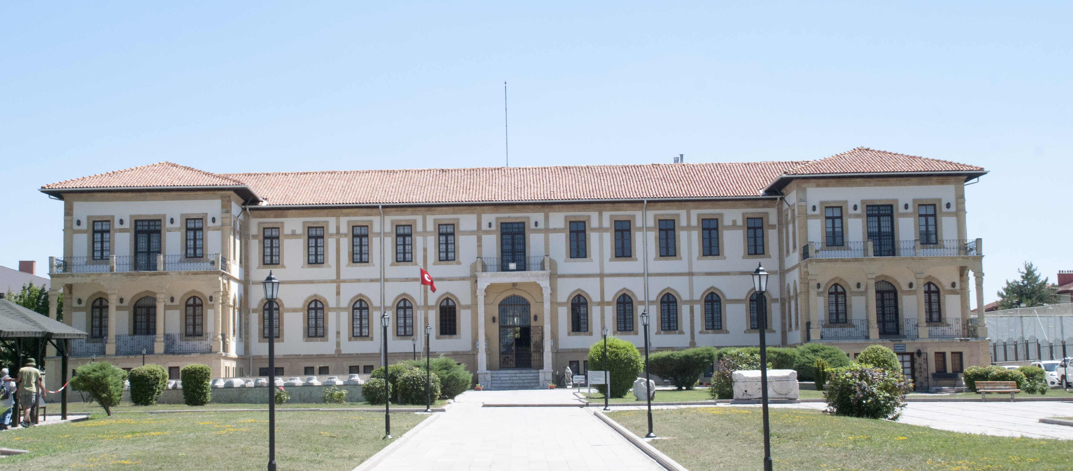 Çorum müze binası